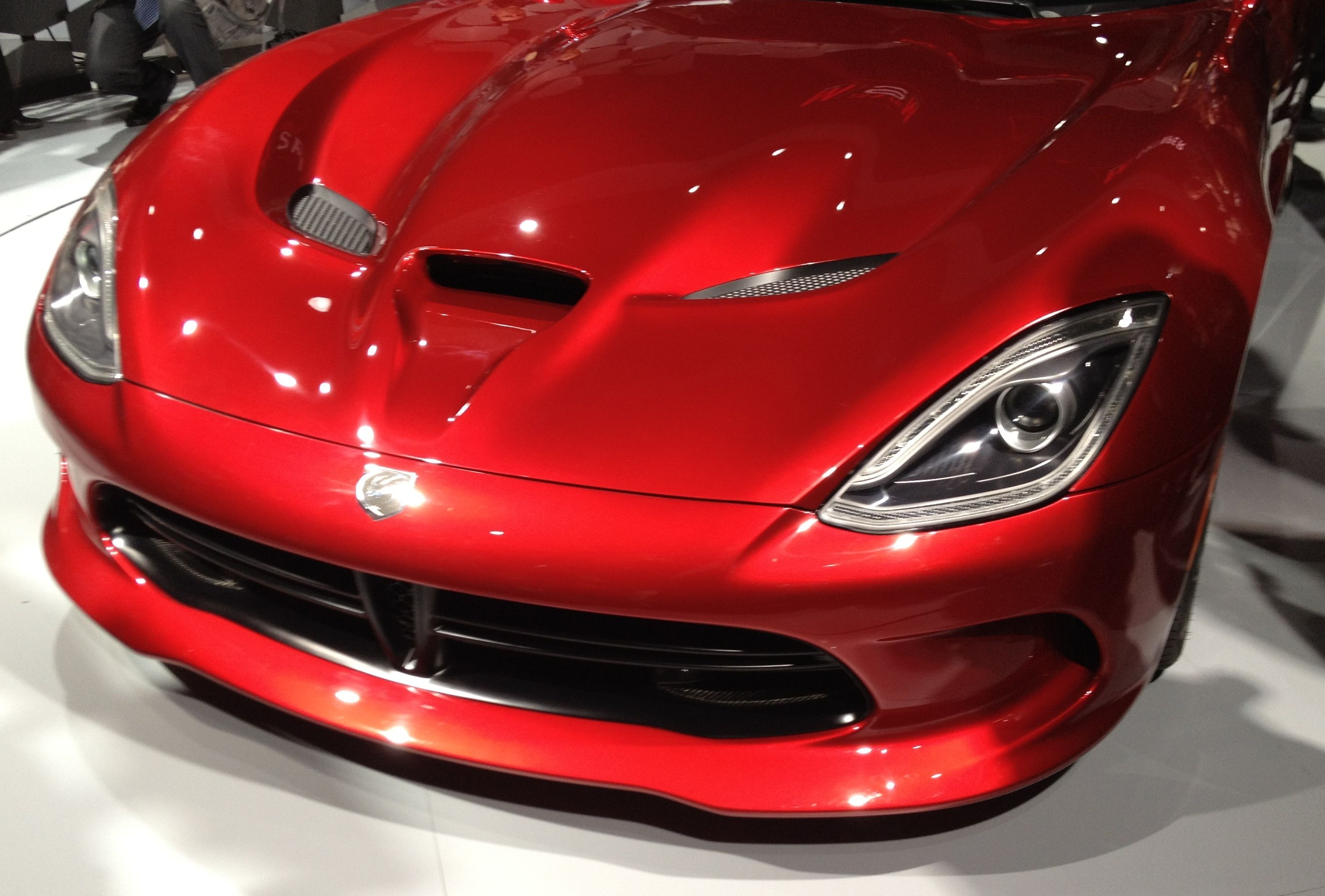 Una SRT Viper GTS